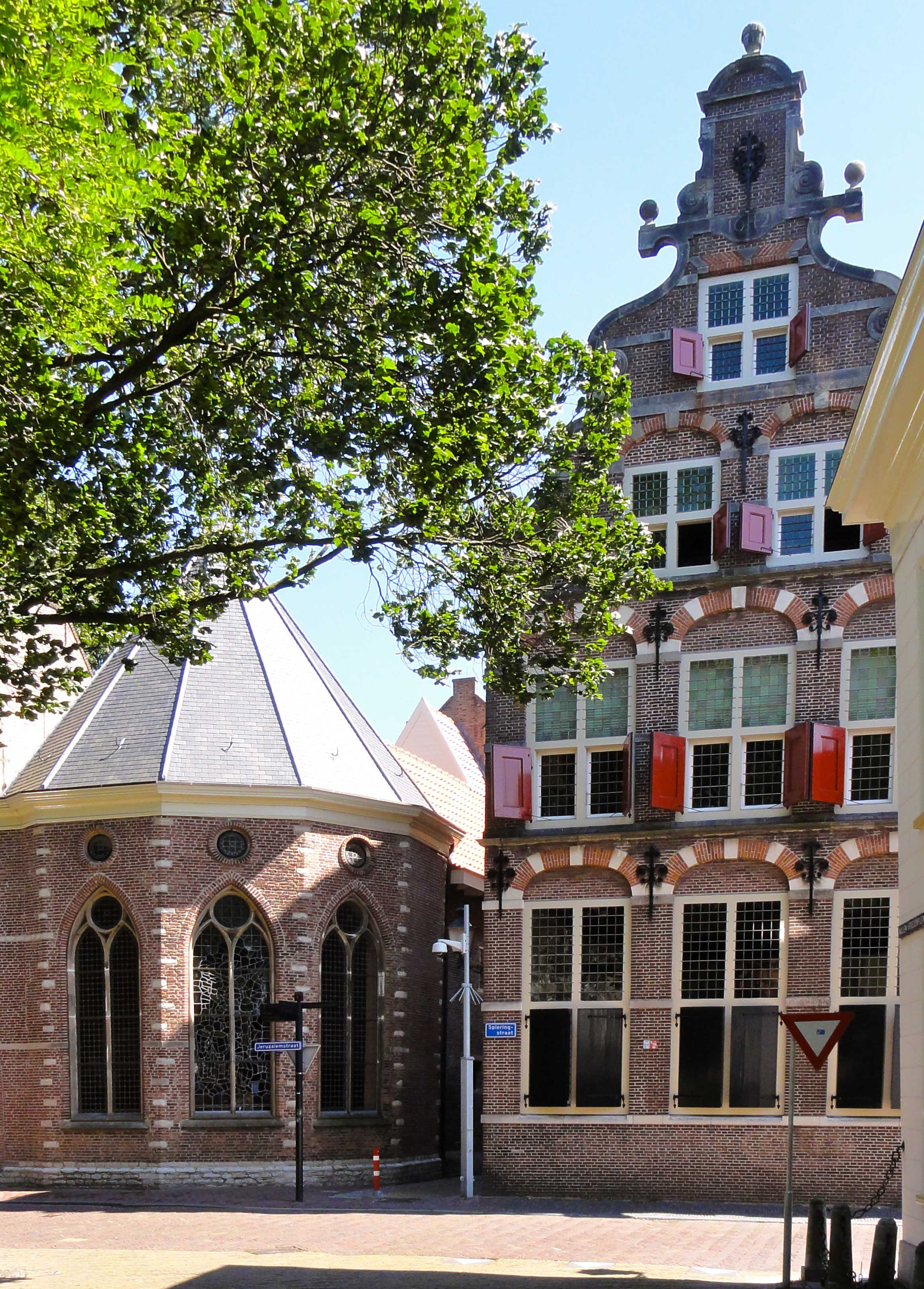 Rechts voormalig weeshuis van Gouda, links Jeruzalemkapel